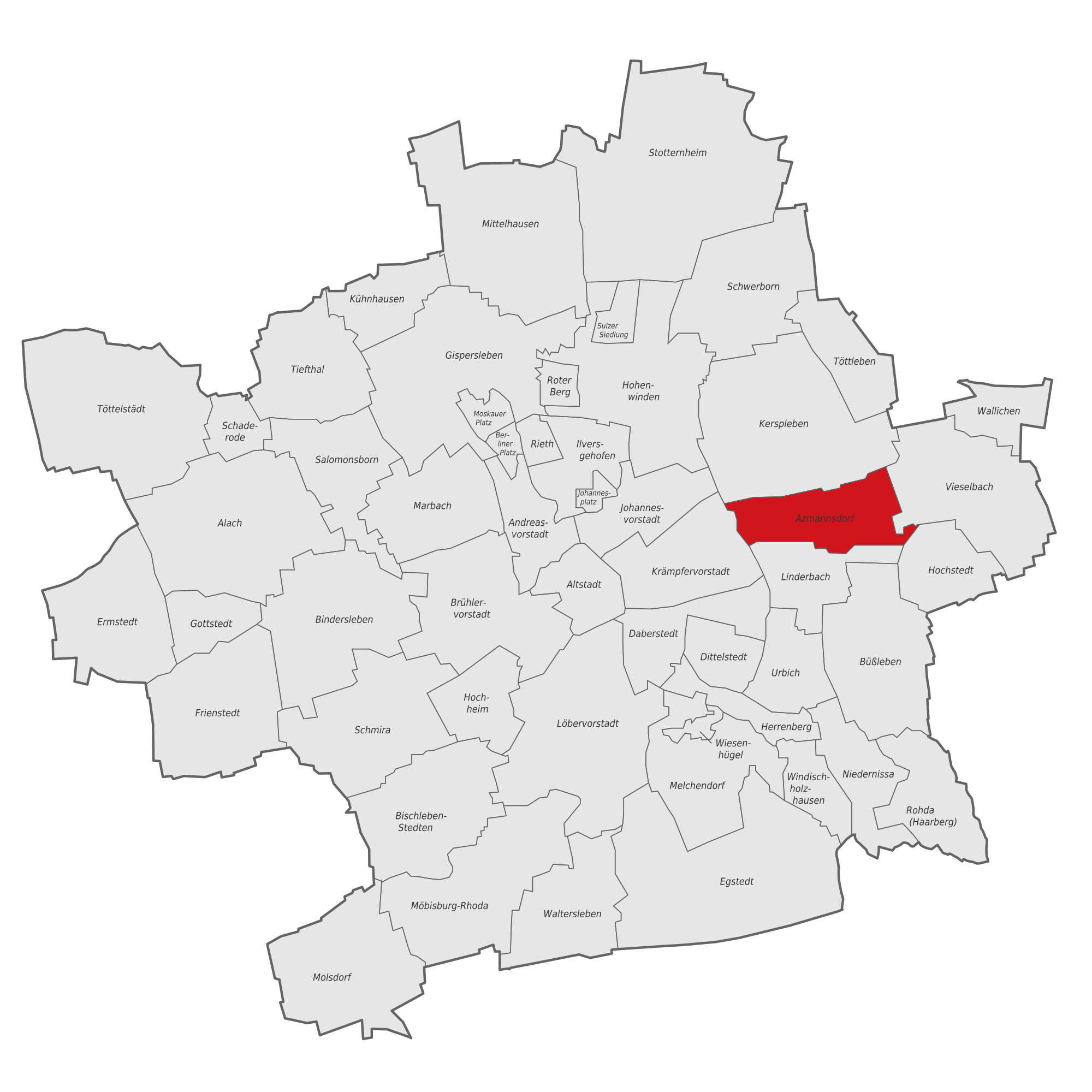 Karte des Stadtgebietes von Erfurt mit Hervorhebung des Ortsteiles Azmannsdorf